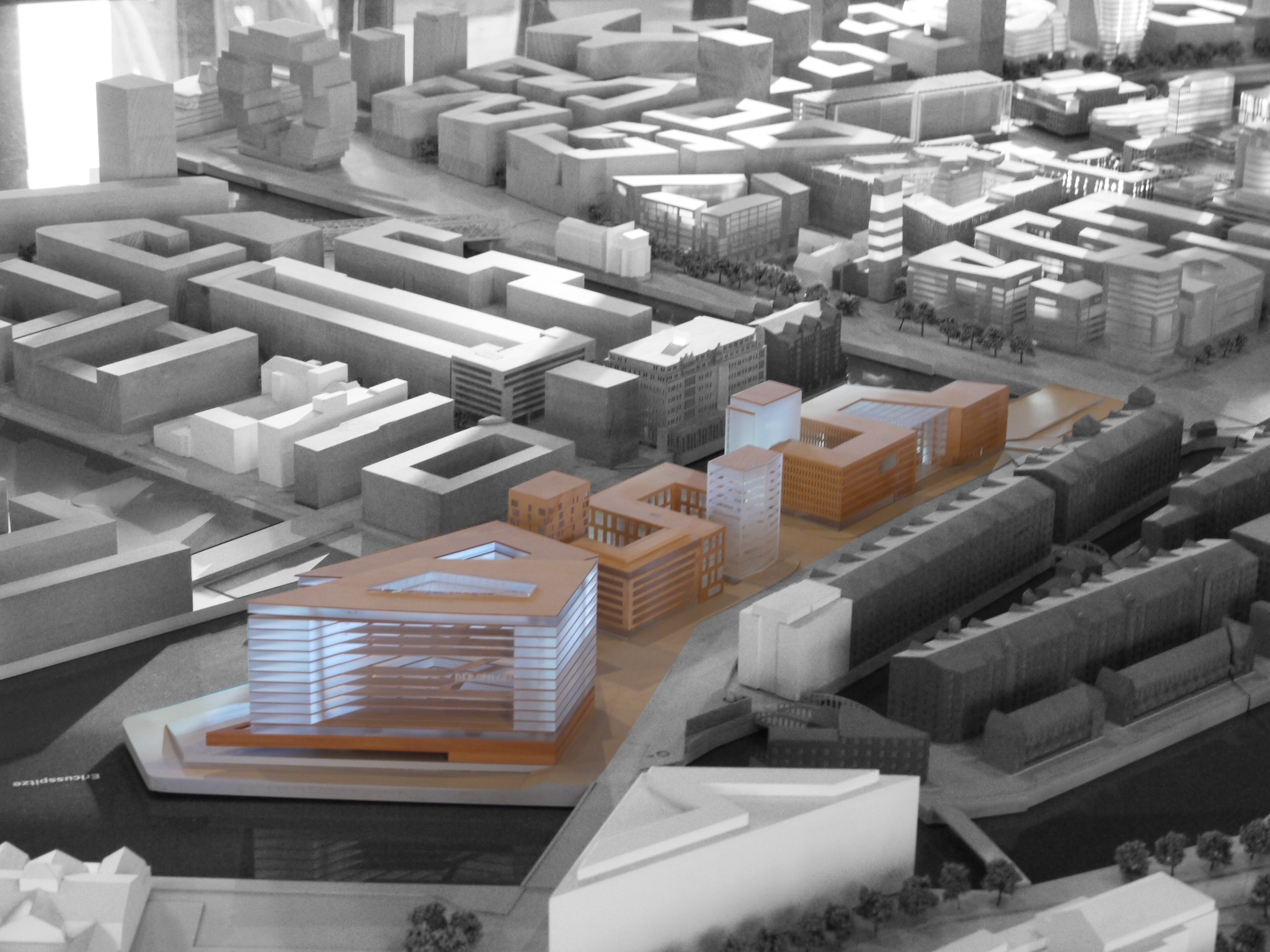 Modell des Quartiers Brooktorkai/Ericus in der HafenCity in Hamburg.